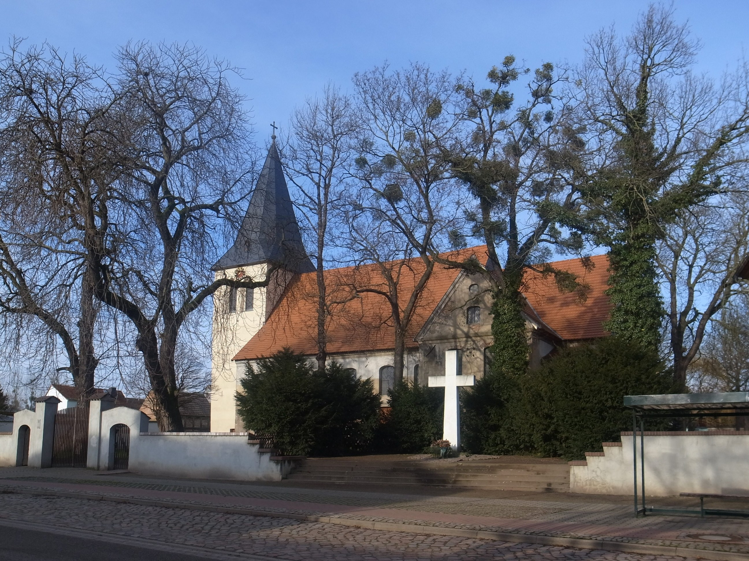 Groß Rosenburg, Denkmal an der Kirche